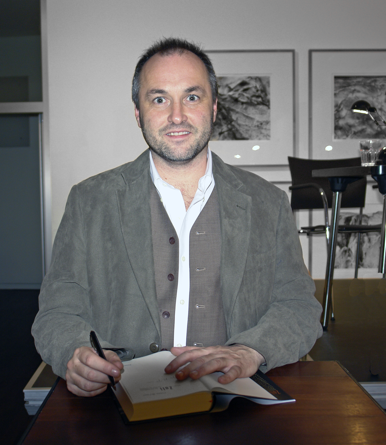 Colum McCann, Schriftsteller/Writer Irland/USA